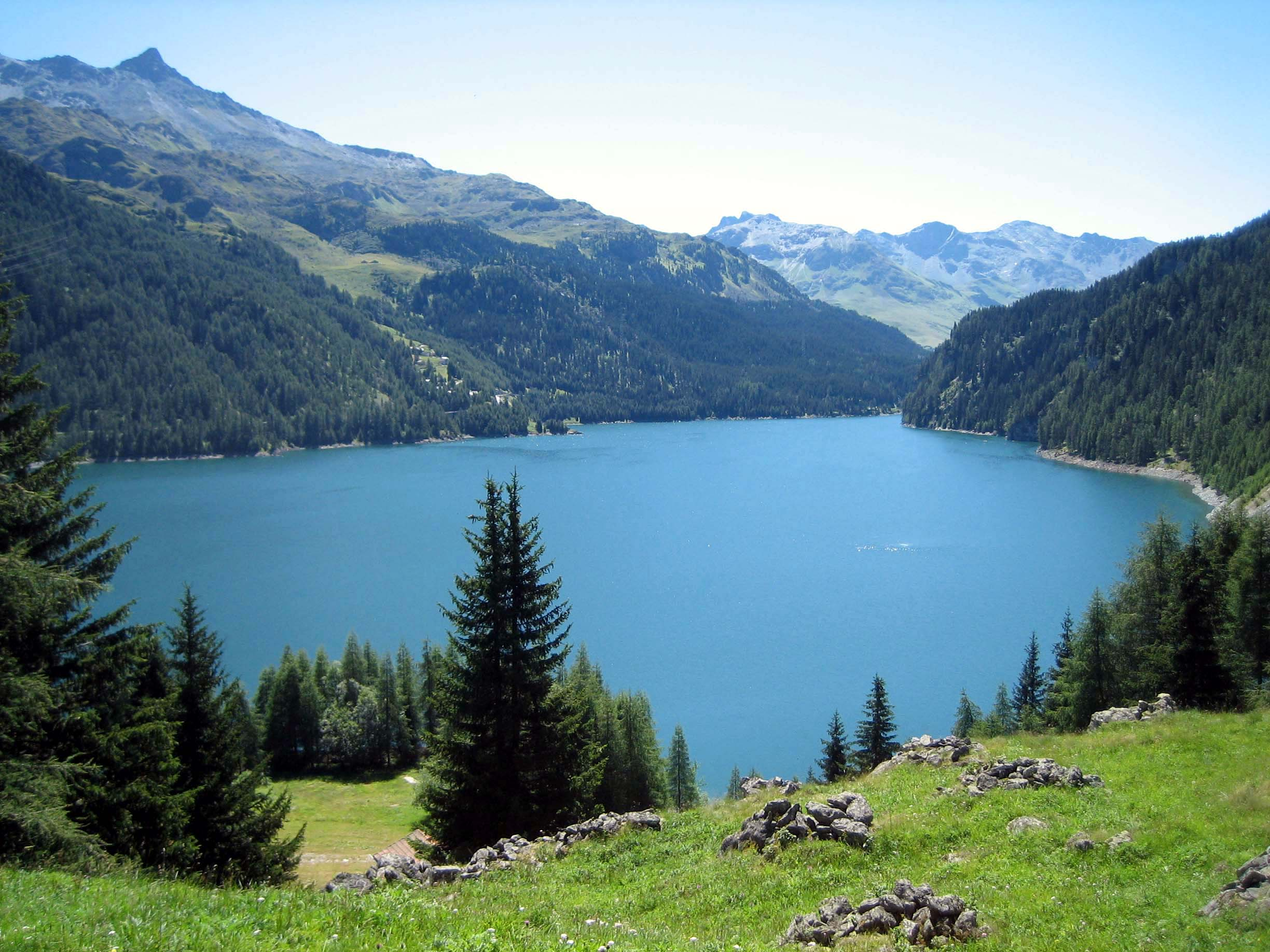 Marmorerasee